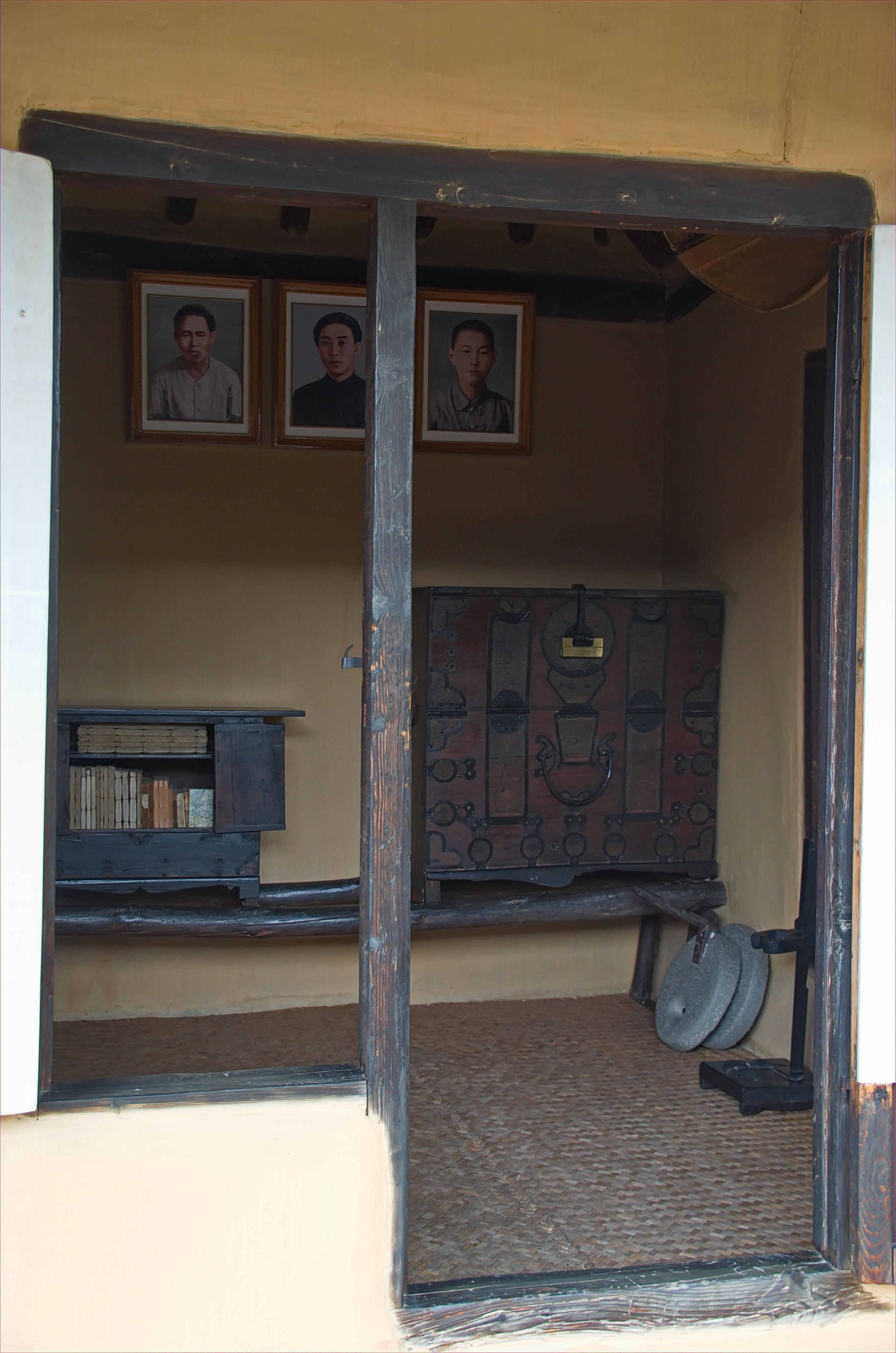 Nordkorea 2015 - Pjöngjang - Geburtshaus Kim Il Sungs in Mangyongdae